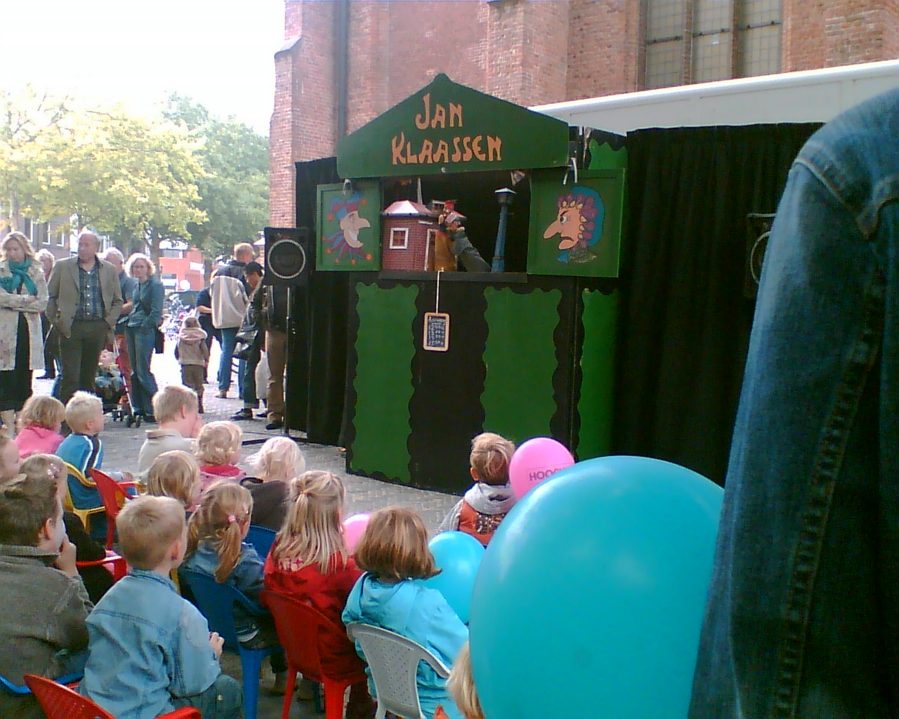 Poppenkast in Woerden met Jan Klaassen en Katrijn, bij de opening van het nieuwe kerkplein in 2006. Gemaakt met een Nokia 3210i camphone.